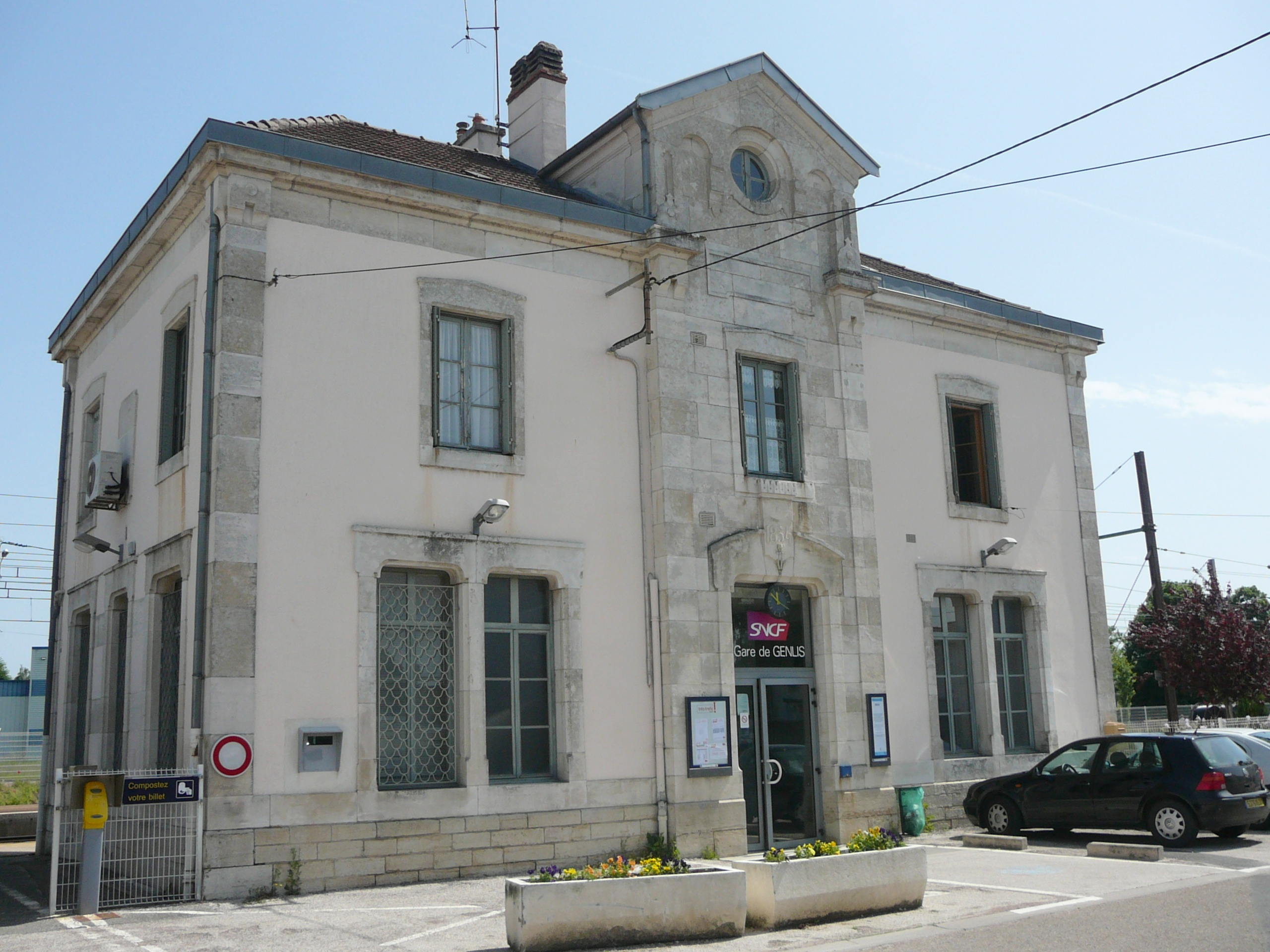 La cour de la gare de Genlis